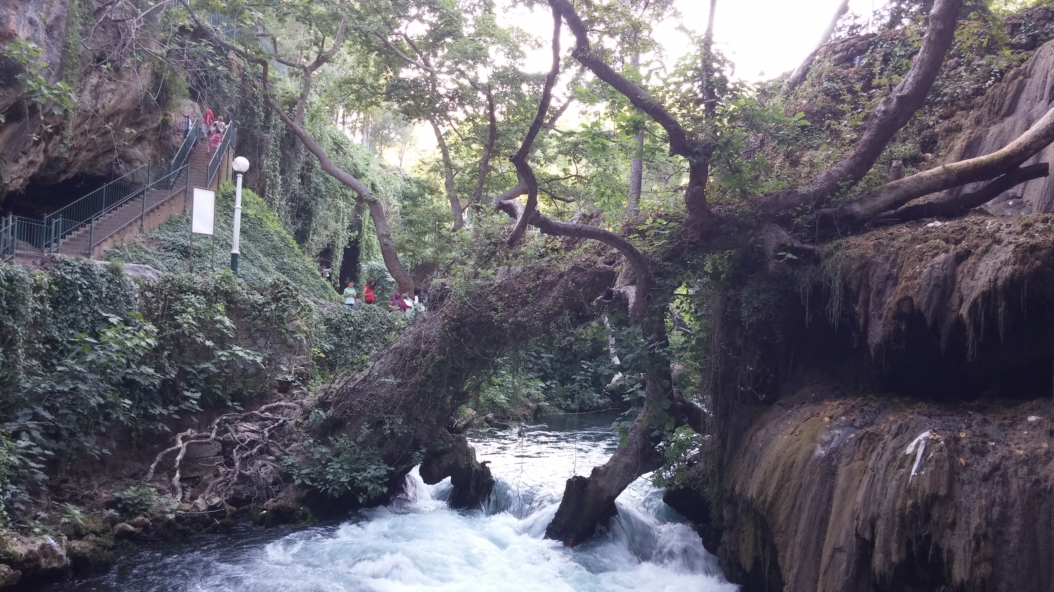 Düden Şelalesi'nde yer alan 27.5 metre uzunluğunda olan ve 2.20 metre çapı bulunan 600 yaşındaki Doğu çınarı.